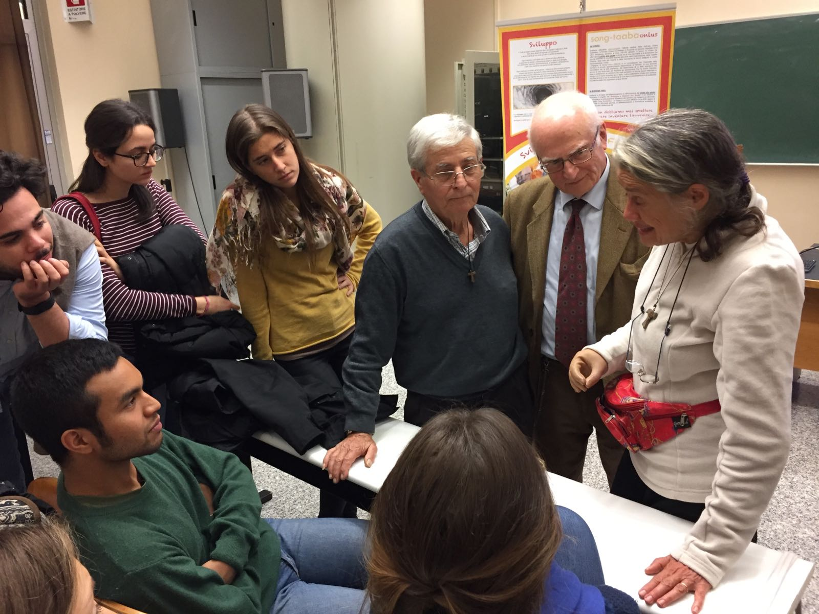 Assemblea in collaborazione con le onlus "Insieme per Chiara Castellani" e "Song-Taaba Onlus"